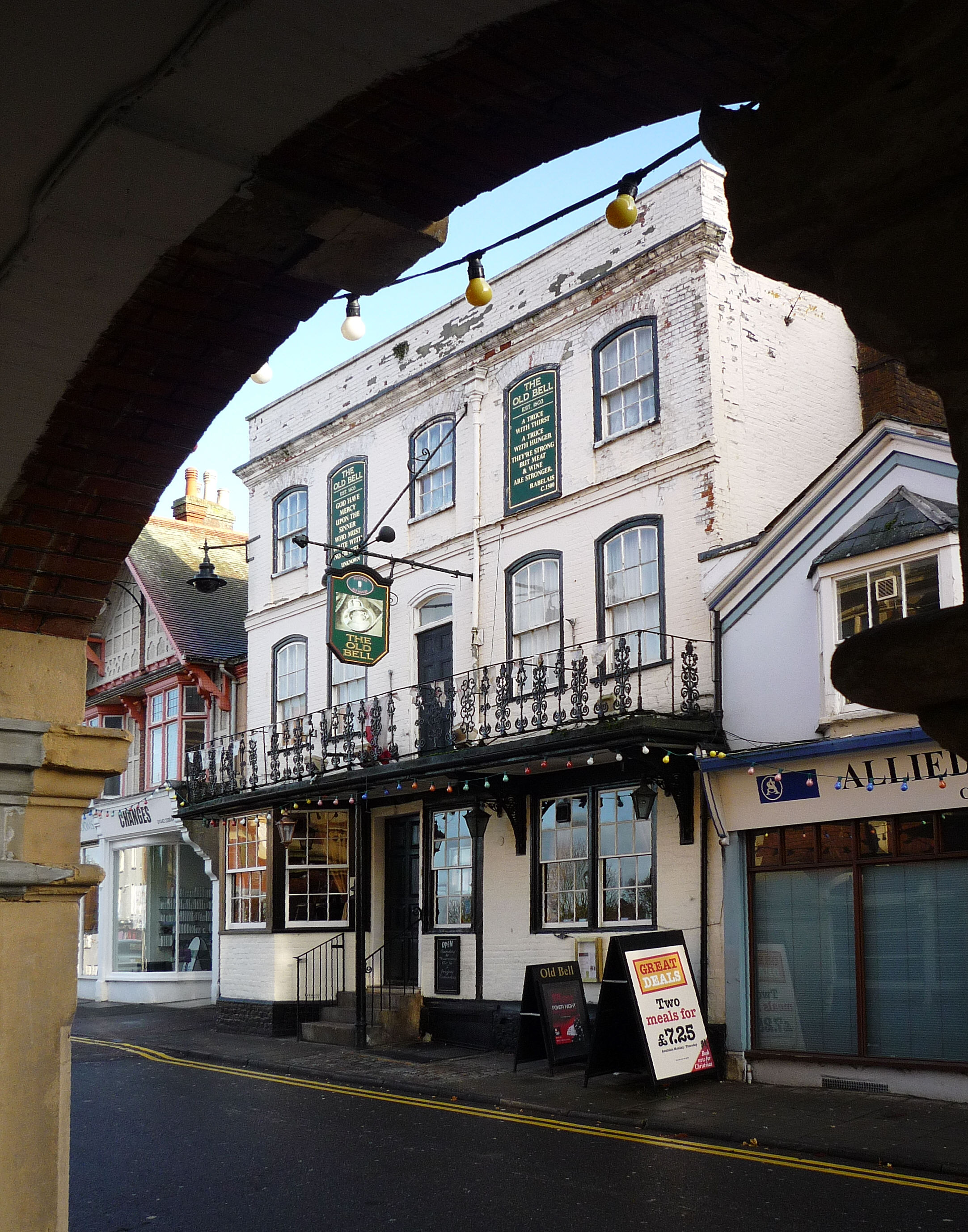 High Street, Hemel Hempstead. Historischer Pub THE OLD BELL. Gelegen gegenüber der Old Town Hall.